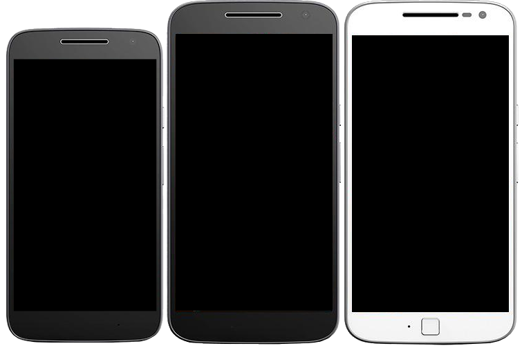 Moto G4 Play Moto G4 and Moto G4 Plus render